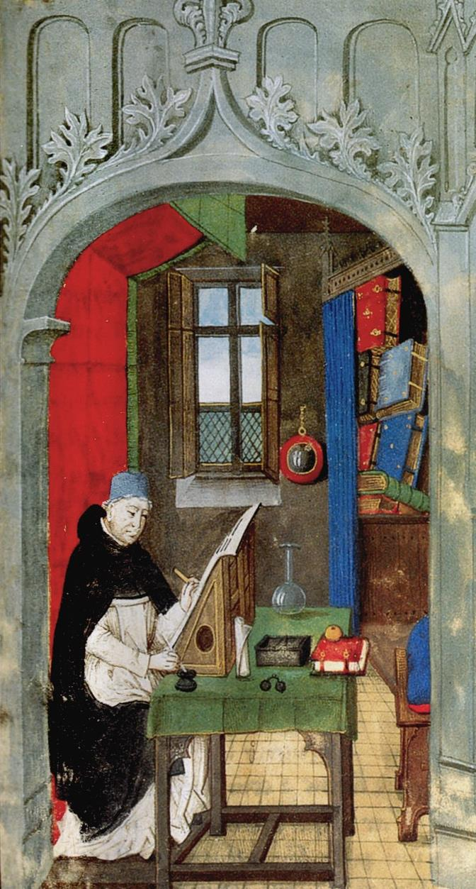 Dominikánus scriptor munka közben. Az asztalon olajlámpa, tintatartó, szemüveg és egy fémtepsi parázzsal, hogy ujjait megmelegíthesse